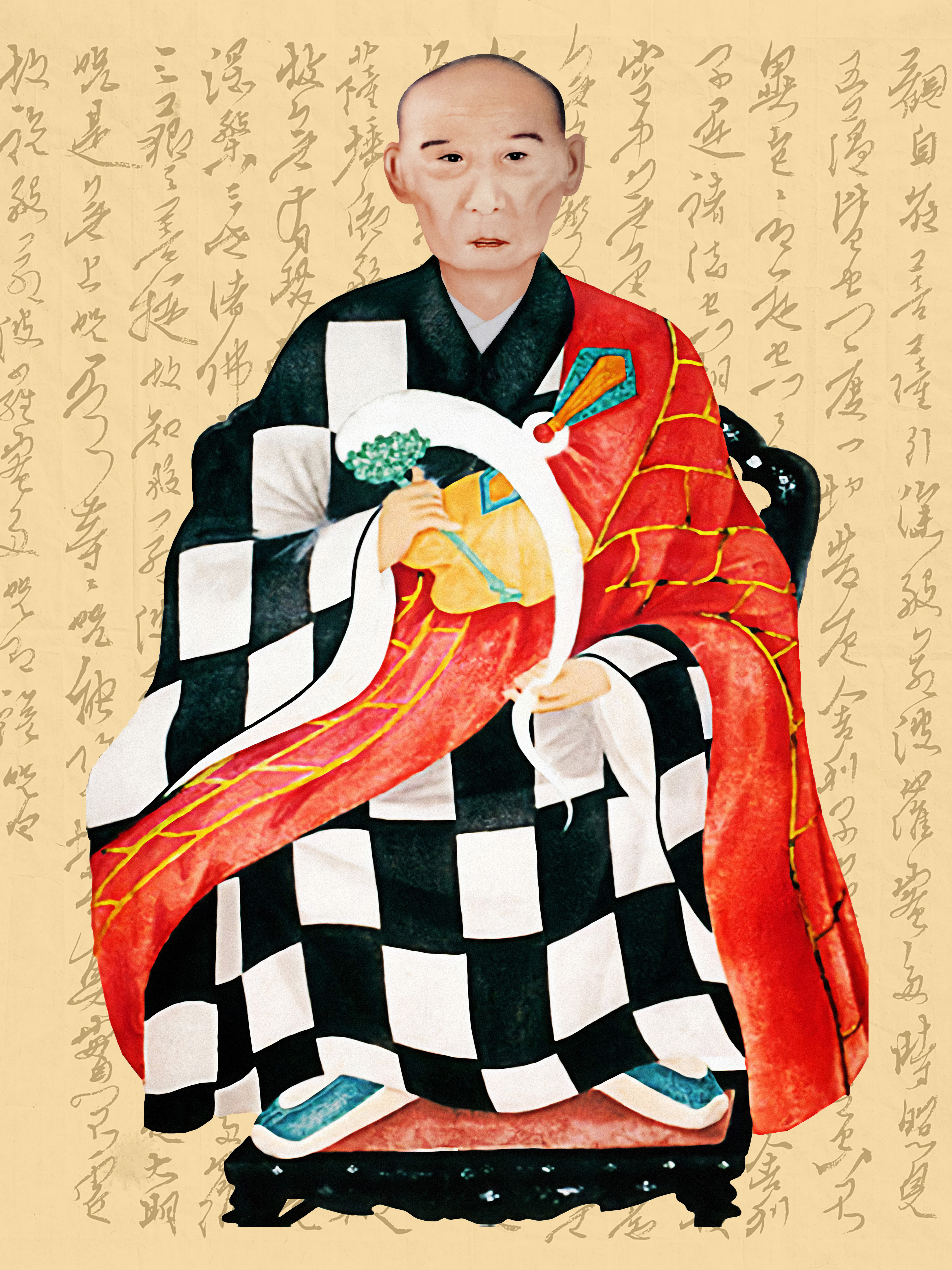 Tăng Cang Tiên Giác Hải Tịnh